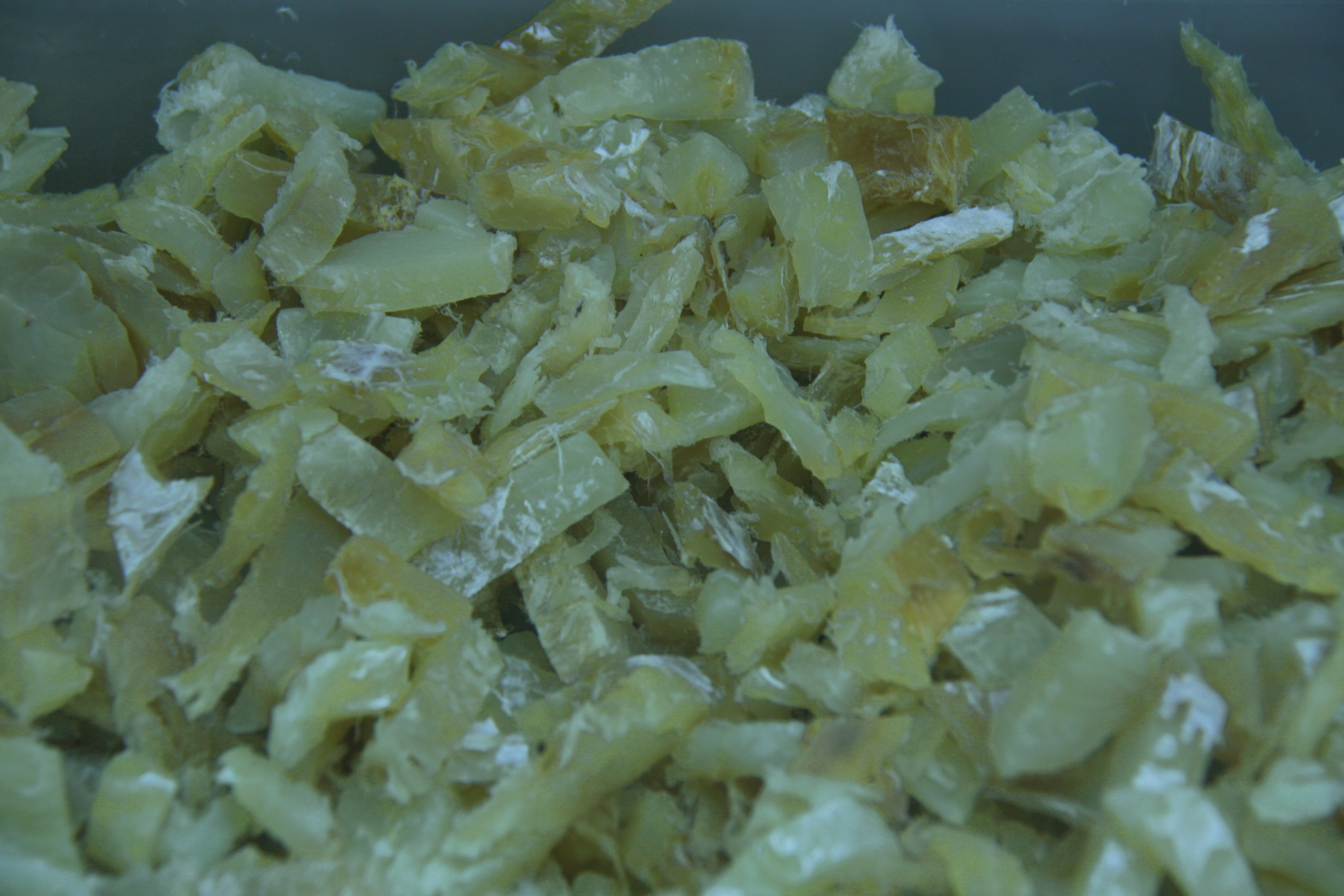 Migas de Bacalao - (Baja salinización)